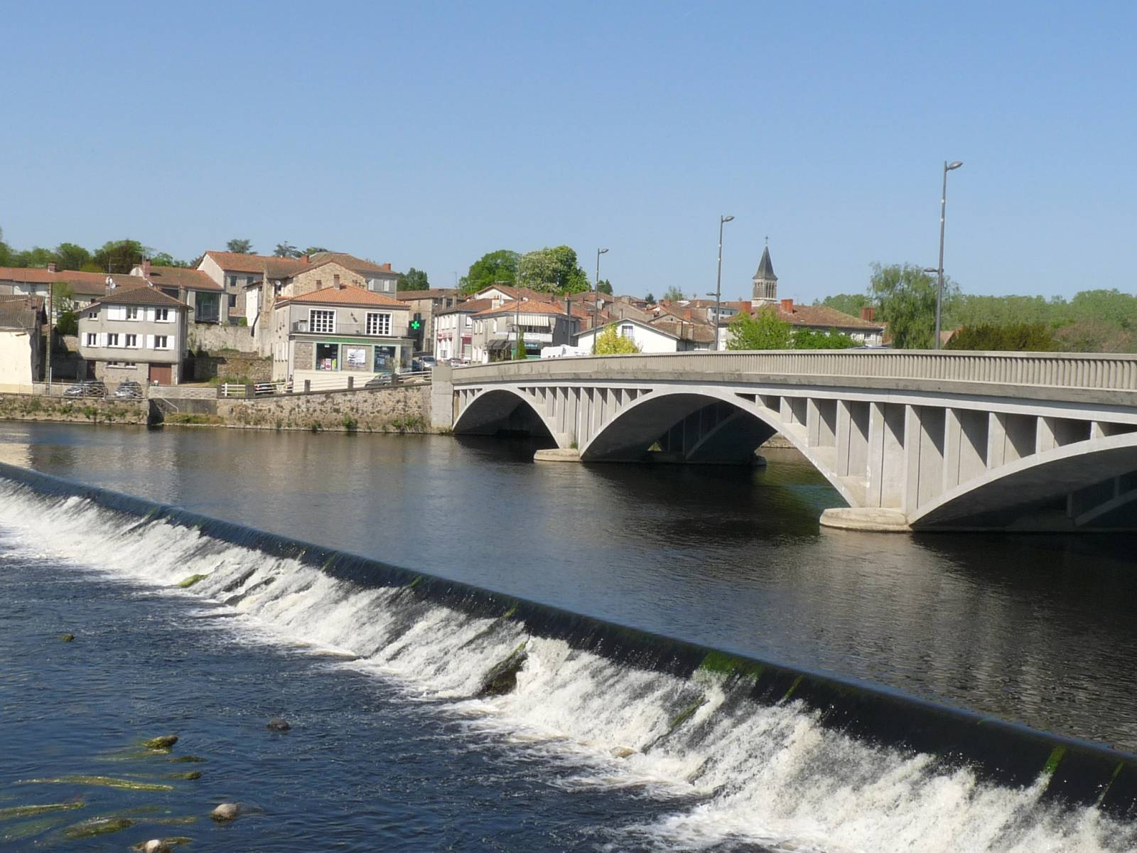 La Vienne et le pont, Chabanais, France